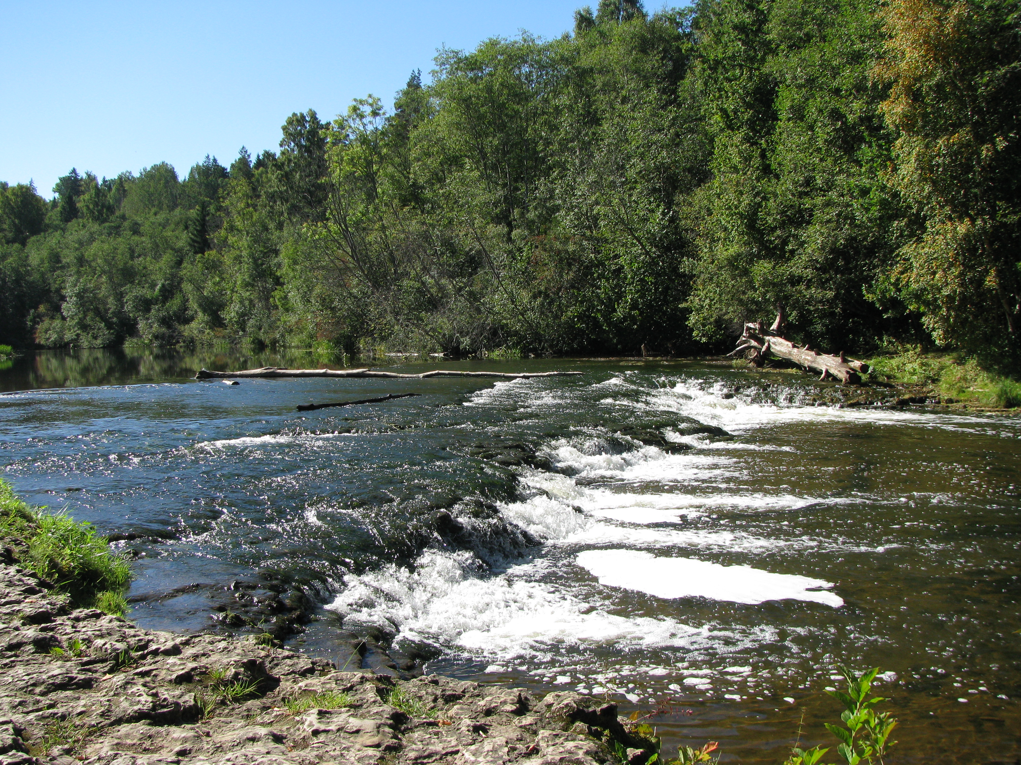 Abavas Rumba_2013